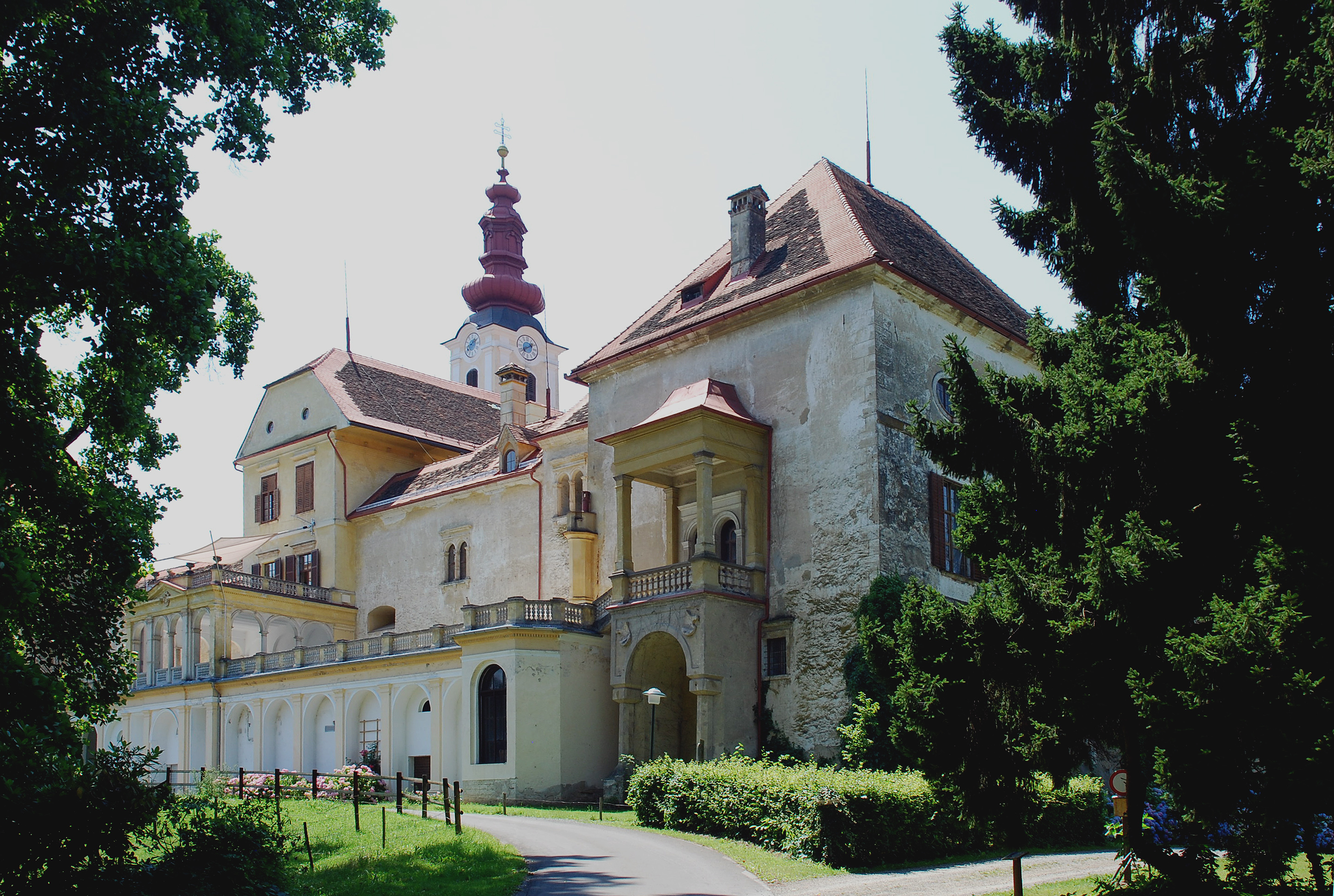 Hollenegg, Steiermark, Österreich: Schloss Hollenegg, Ostseite